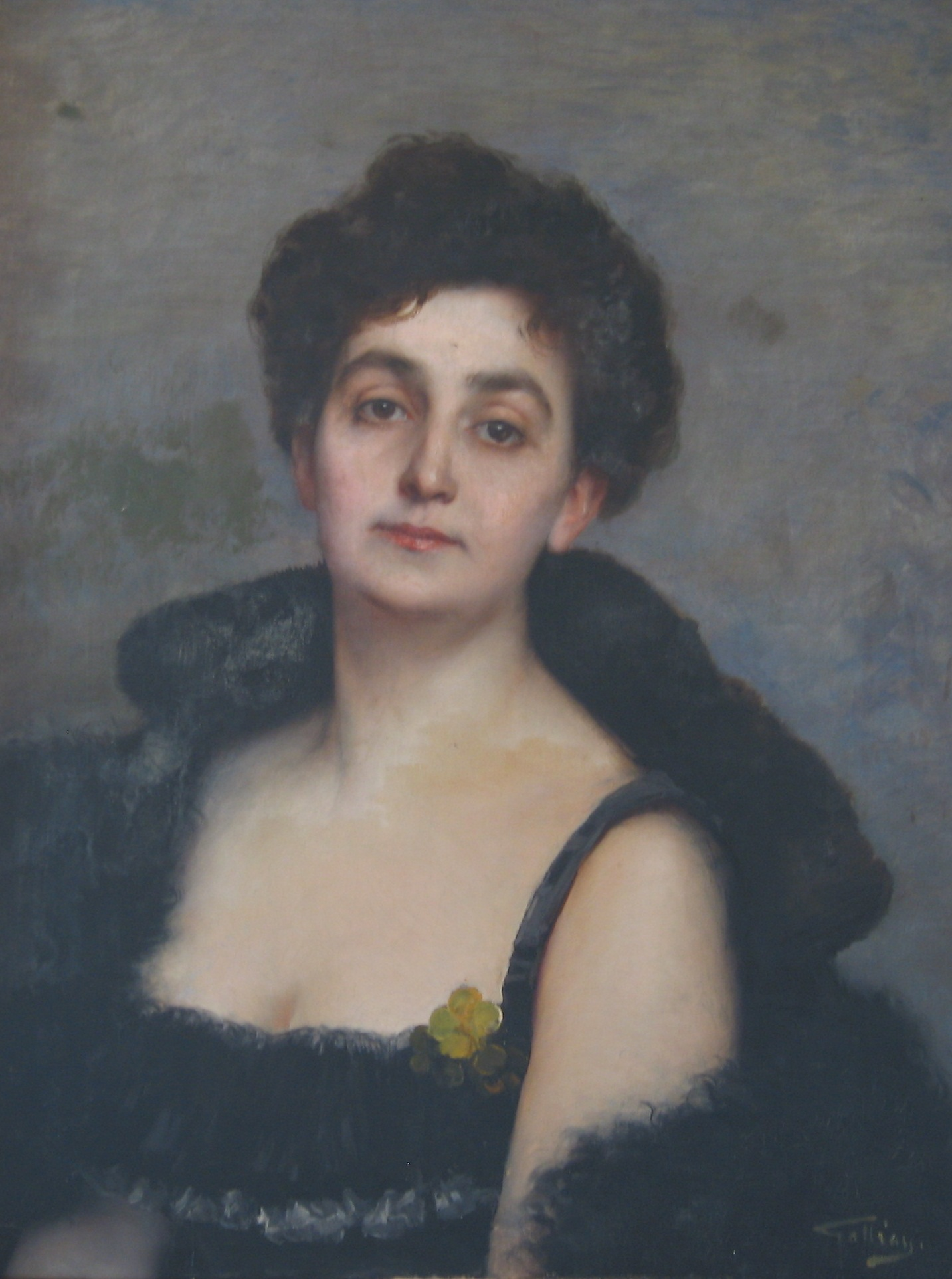 Portrait of Honorine Gallian née Lambert